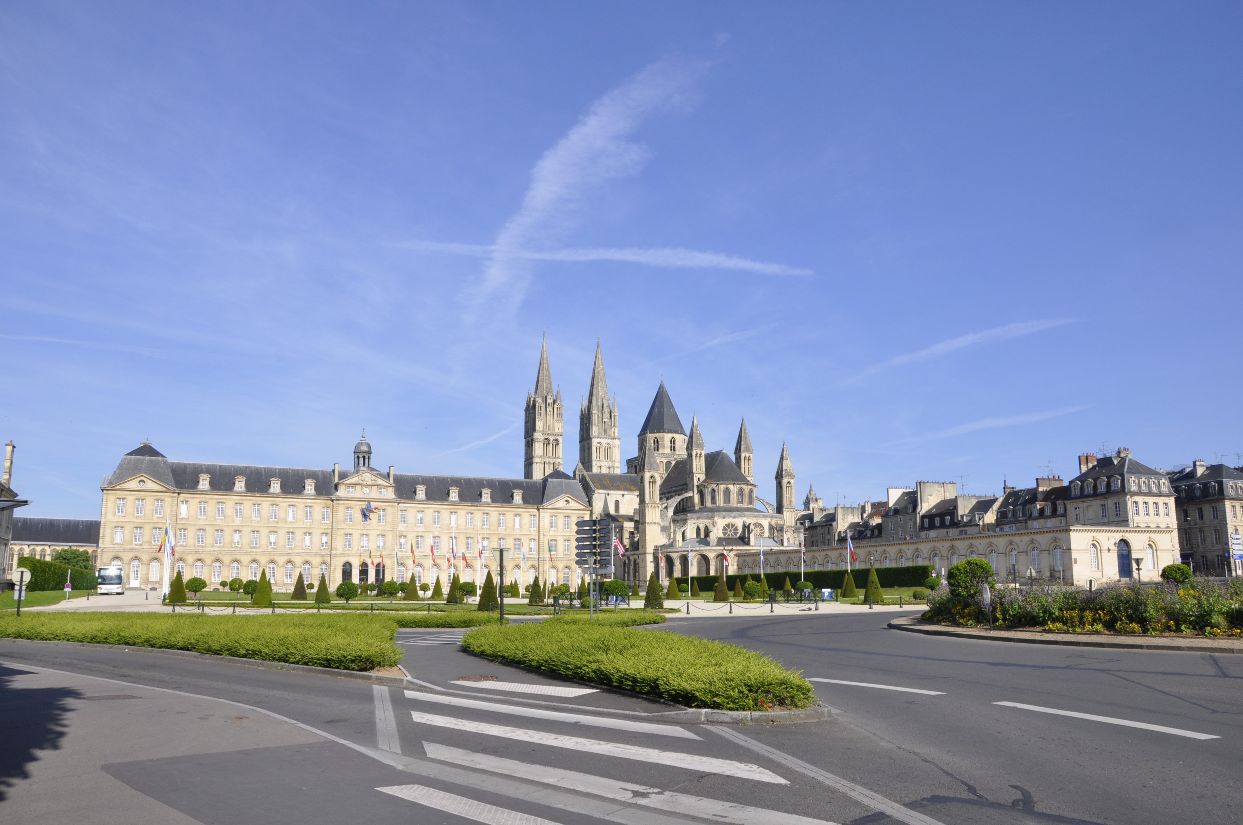 l'abbaye aux hommes de Caen, actuelle mairie et ancien lycée Malherbe